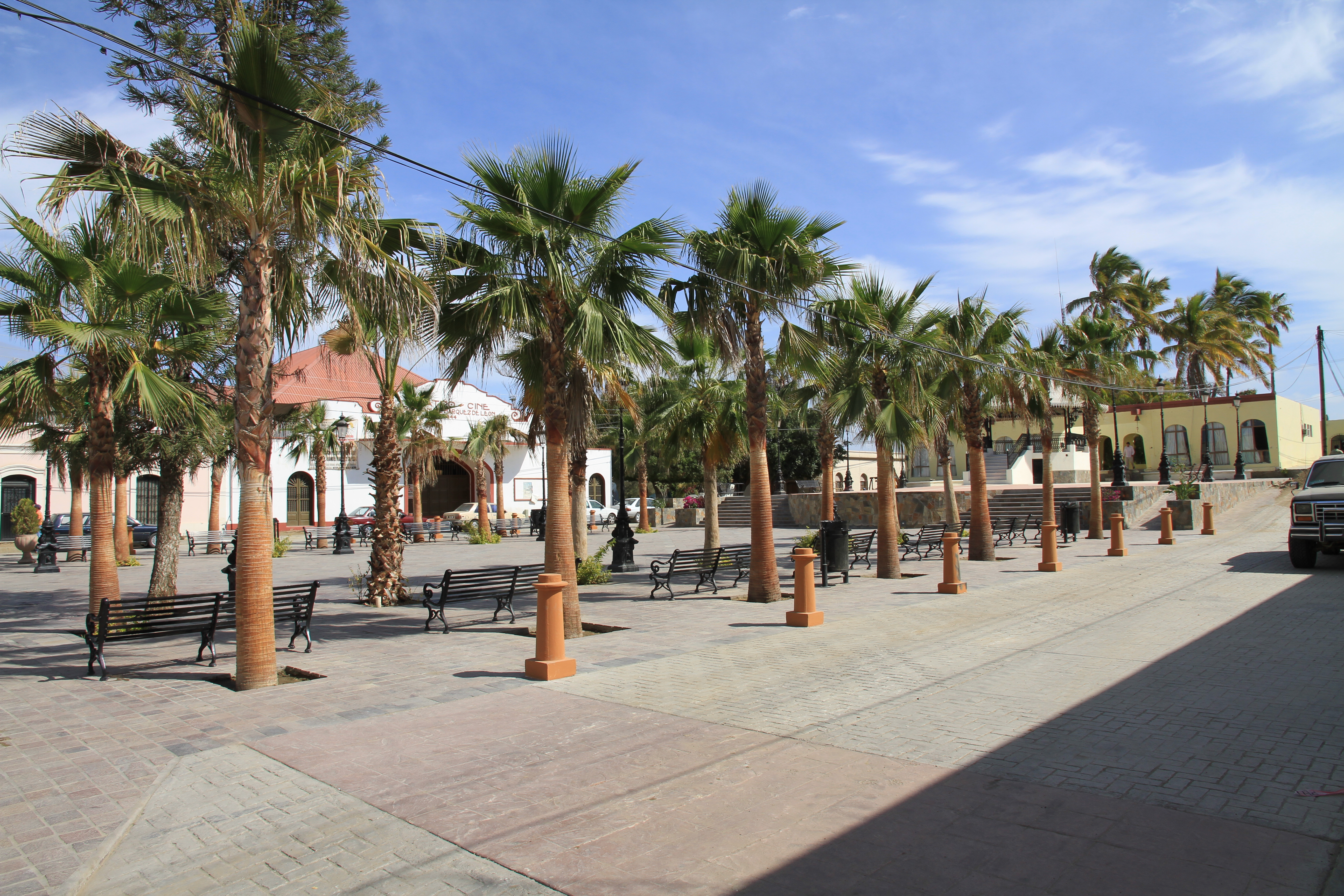 Plaza Todos Santos BCS